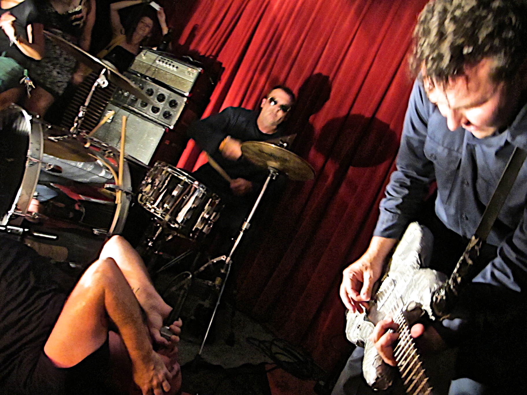 @ AS220